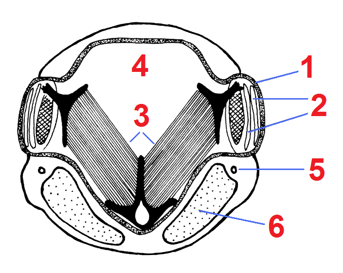 Tymbal- und Tympanalorgane einer männlichen Singzikade, Abdomenbasis von vorn, quer. Nach einer Zeichnung in W. Westheide & R. Rieger (Hrsg.): Spezielle Zoologie, Teil 1: Einzeller und Wirbellose Tiere. Gustav Fischer Verlag, Stuttgart, Jena, New York, 1996. S. 652, ISBN 3-437-20515-3